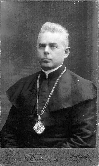 Konstantinas Olšauskas